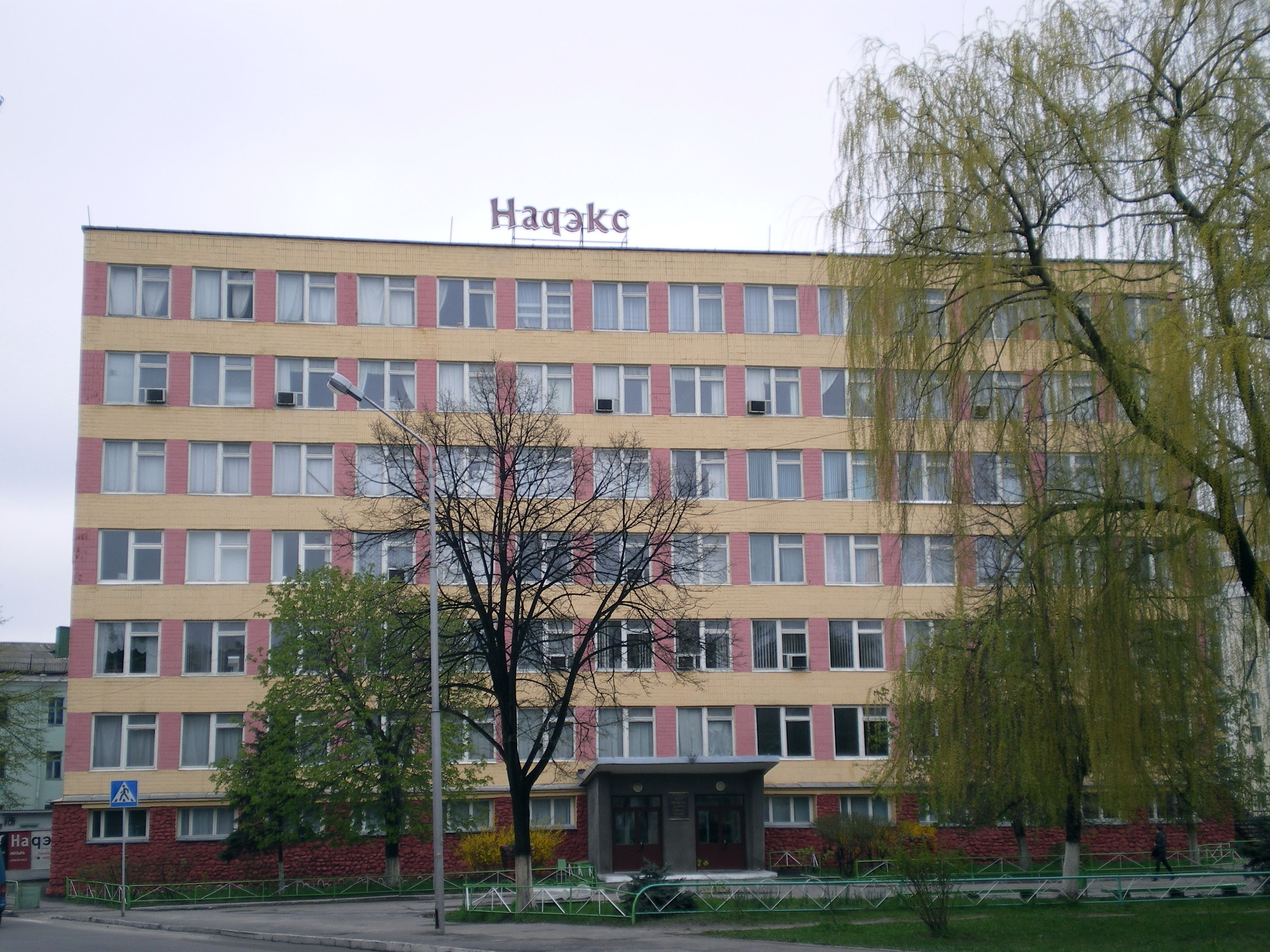 Мозырь.Фабрика "Надэкс".